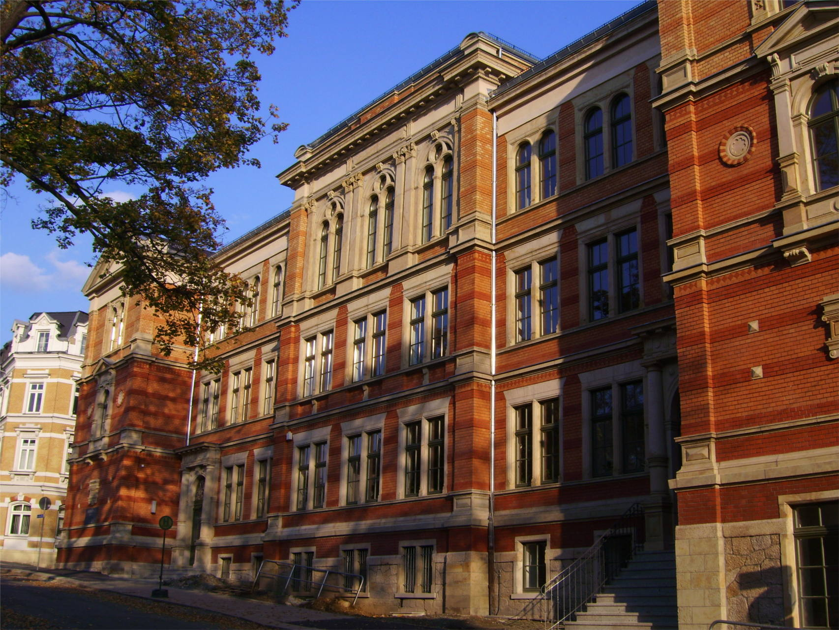 Mittelschule Oelsnitz